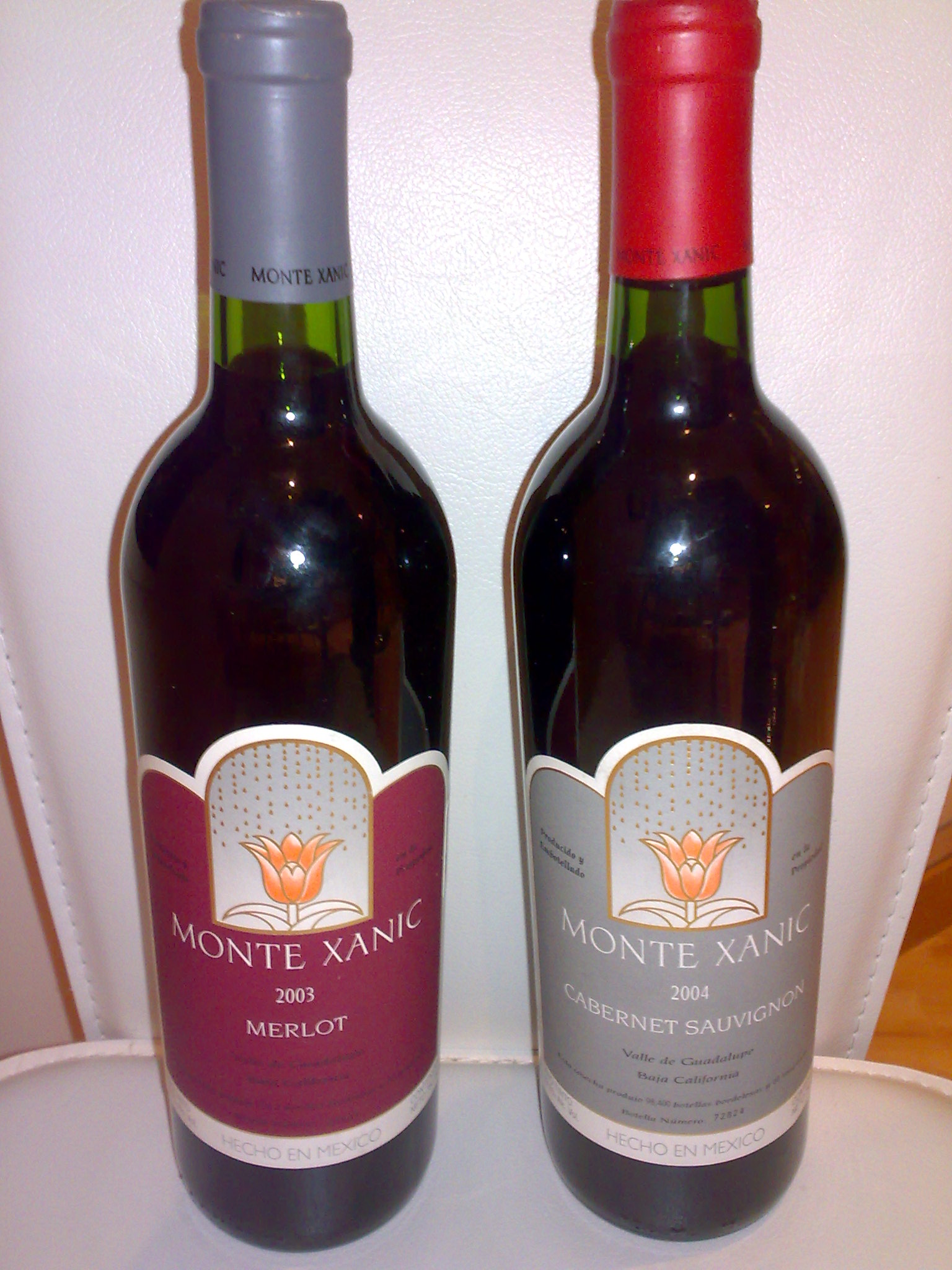 Vino Monte Xanic de Baja California, México